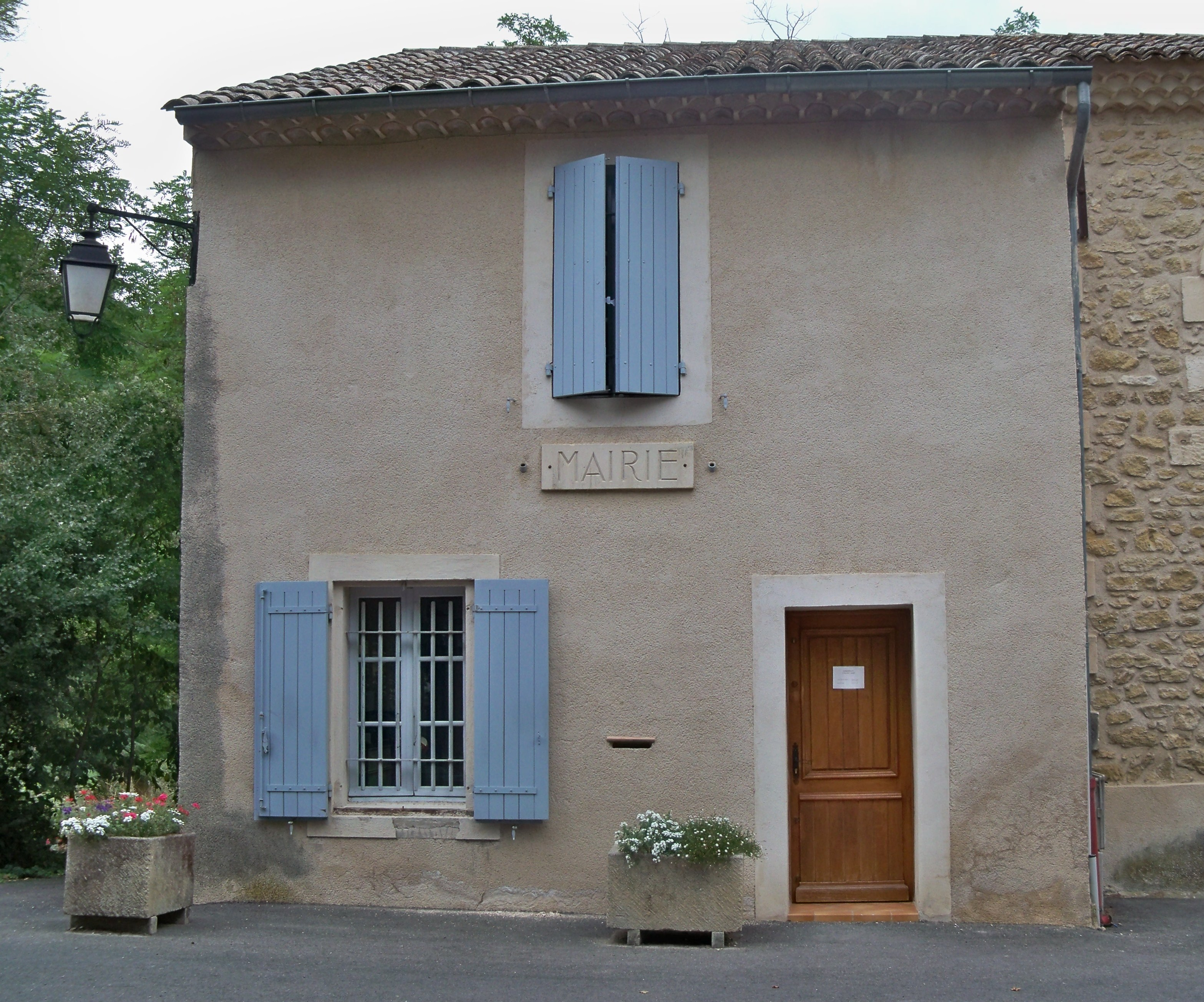 Mairie de Puget sur Durance, Vaucluse, France